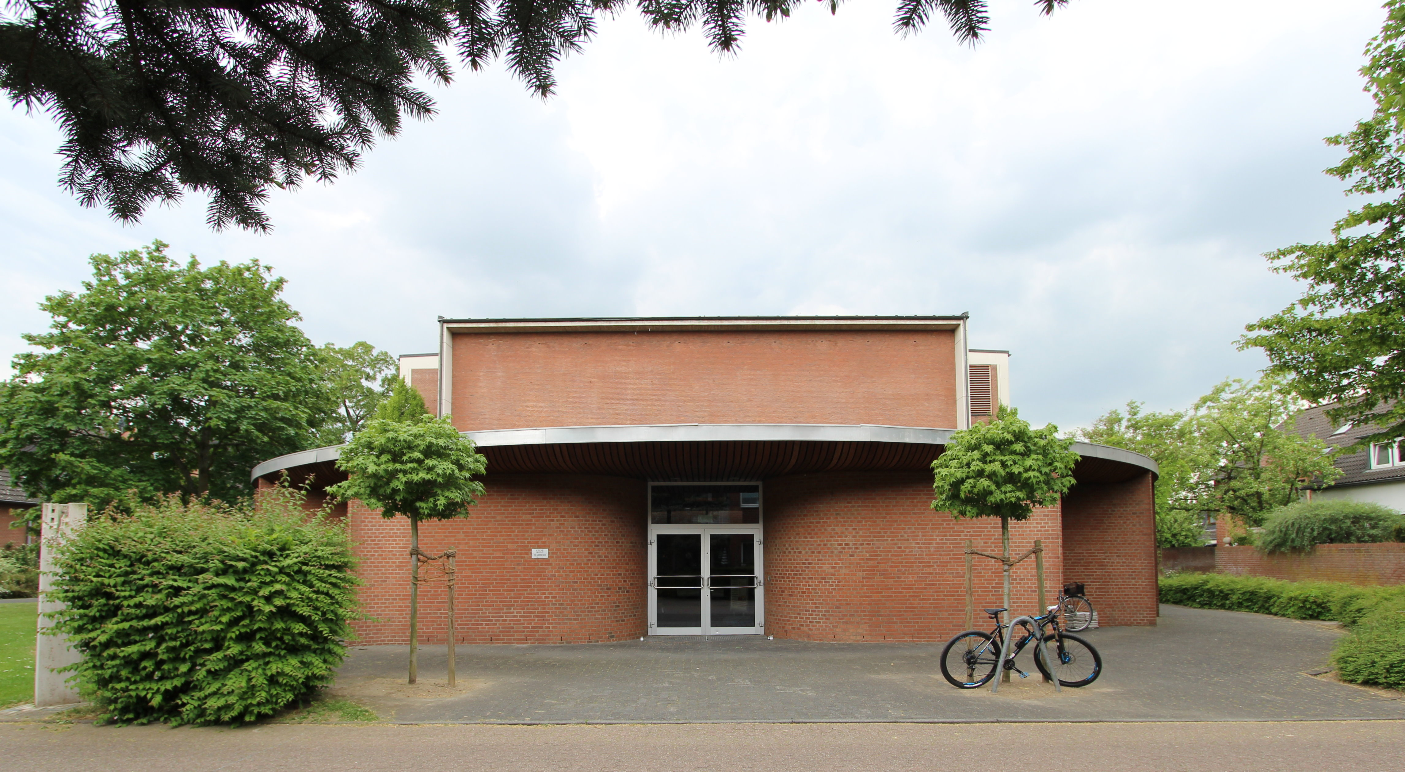 40468 Düsseldorf-Stockum; Carl-Sonnenschein-Straße 37. Katholische Kirche "Heilige Familie" von dem Architekten Hans Schwippert. Ansicht aus Osten. Aufnahme von 2016.